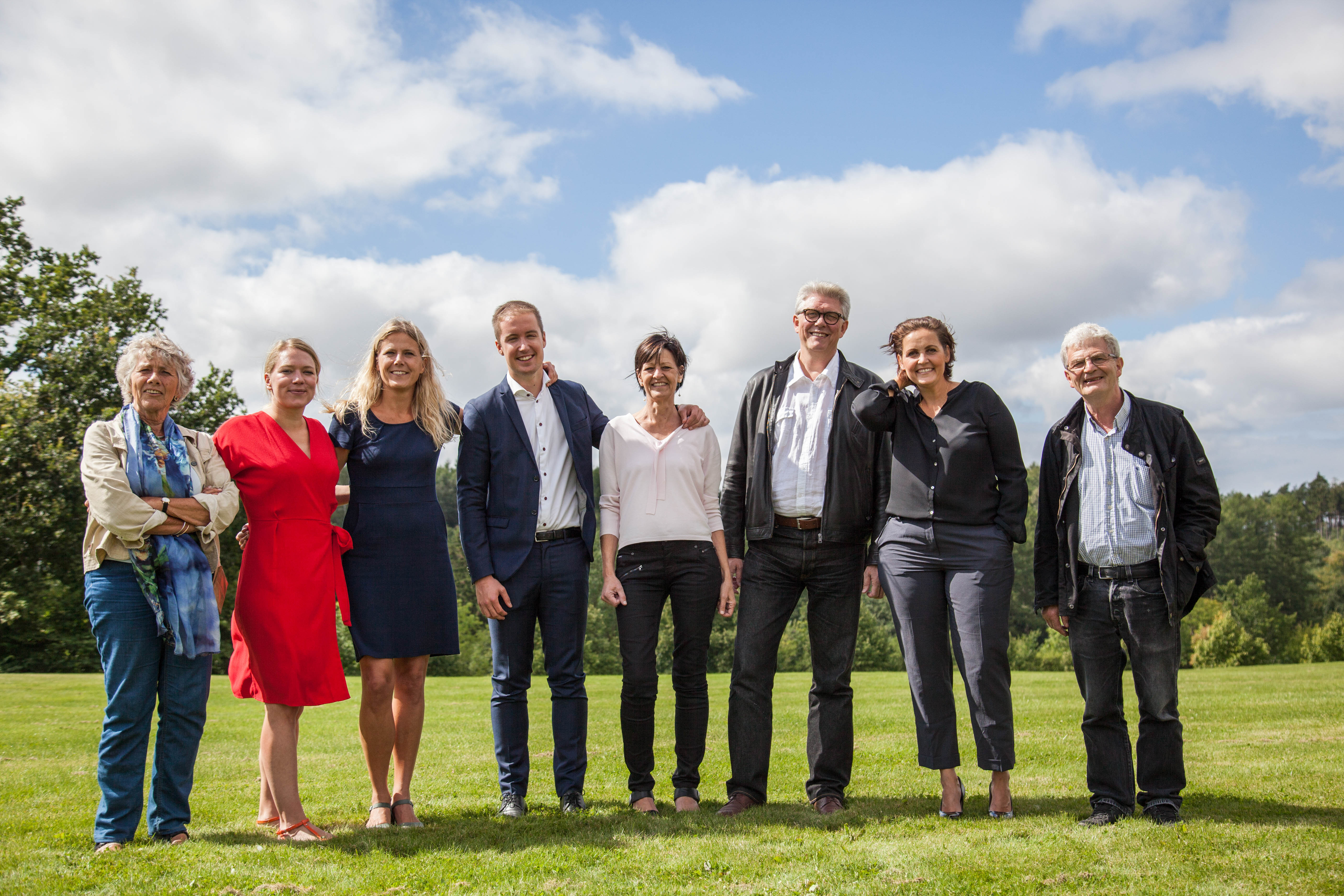 SF's folketingsgruppe samt medlem af Europaparlamentet ved SF's sommergruppemøde 2016